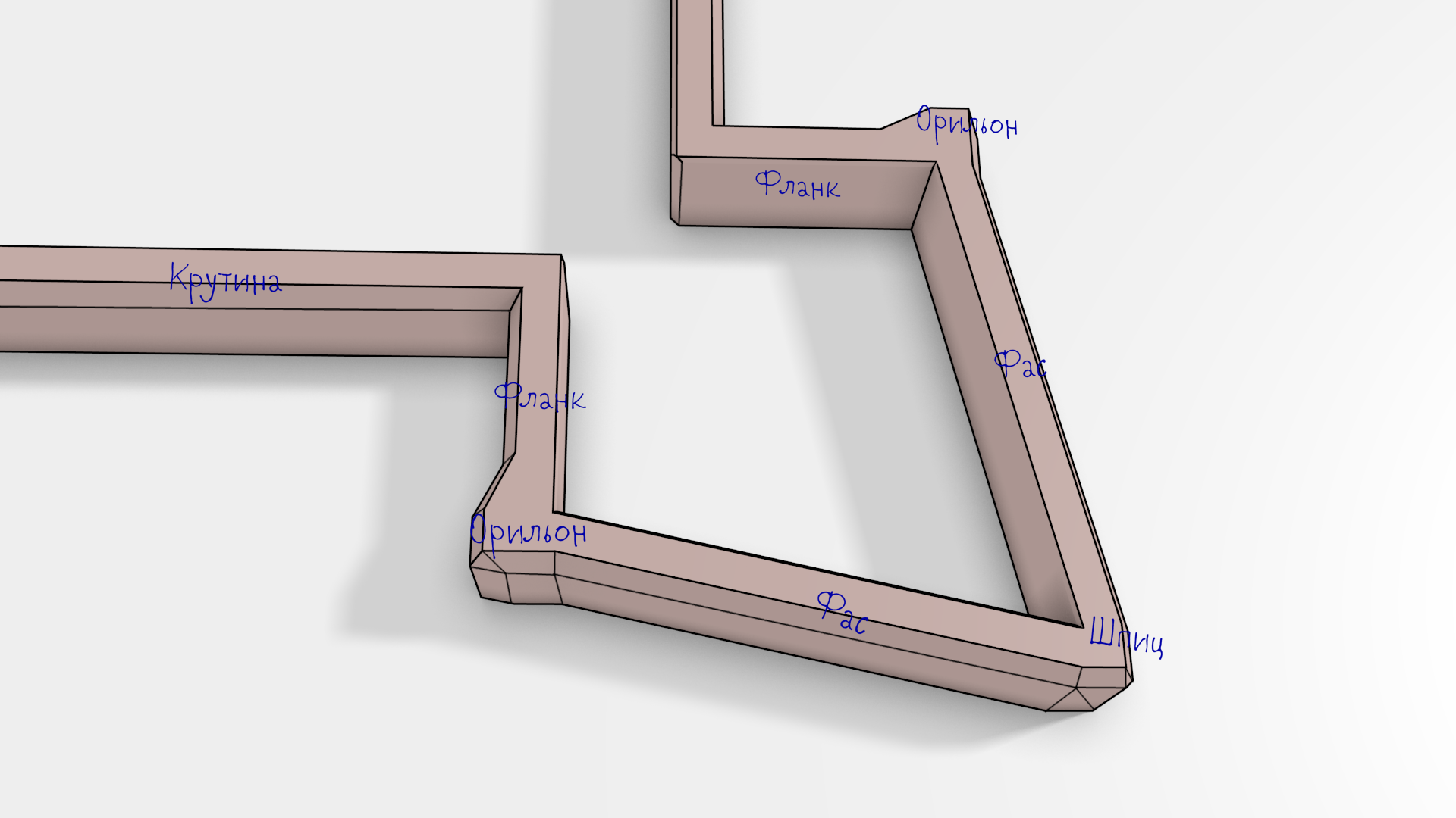 Устройство бастиона.